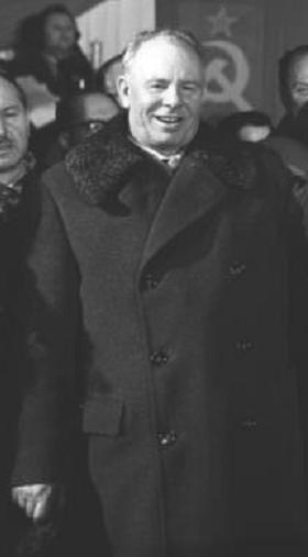 Factual corrections and alternative descriptions are encouraged separately from the original description. Additionally errors can be reported at this page to inform the Bundesarchiv. Original historic description: Berlin, VI. SED-Parteitag, Ulbricht, Chruschtschow Zentralbild /Junge 14.1.1963 N.S. Chruschtschow in Berlin eingetroffen Der Erste Sekretär des ZK der KPdSU, N.S. Chruschtschow, traf am Abend des 14.1.1963 an der Spitze der sowjetischen Delegation zum VI. Parteitag der SED in der Hauptstadt der DDR ein. Die repräsentative Abordnung der sowjetischen Bruderpartei wurde auf dem Berliner Ostbahnhof vom Ersten Sekretär der ZK der SED, Walter Ulbricht, und weiteren Mitgliedern des Politbüros herzlich willkommen geheißen. UBz: Während der Begrüßungskundgebung in der Vorhalle des Ostbahnhofes. (V.l.n.r.) Nikolia Podgorny, Mitglied des Prasidiums des ZK der KPdSU und Erster Sekretär des ZK der KP der Ukraine, Walter Ulbricht, N.S. Chruschtschow und der Kandidat des Politbüros der ZK der SED und 1. Sekretär der Bezirksleitung Groß-Berlin der SED Paul Verner. Abgebildete Personen: * Chruschtschow, Nikita S.: Ministerpräsident, erster Sekretär der KP, Sowjetunion (GND 118638378) * Podgorny, Nikolai: Vorsitzender des Präsidiums des Obersten Sowjets, Sowjetunion * Ulbricht, Walter: Staatsratsvorsitzender, Erster Sekretär des Zentralkomitees (ZK) der SED, Vorsitzender des Nationalen Verteidigungsrates, DDR * Verner, Paul: Vorsitzender des Staatsrates, Sekretär des Zentralkomitees der SED, Präsident des Nationalrates der Nationalen Front, DDR